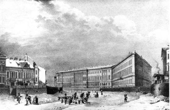 «Здание Главного штаба и министерств со стороны Мойки» Литография К. П. Беггрова с рис. В. С. Садовникова. 1830-е гг